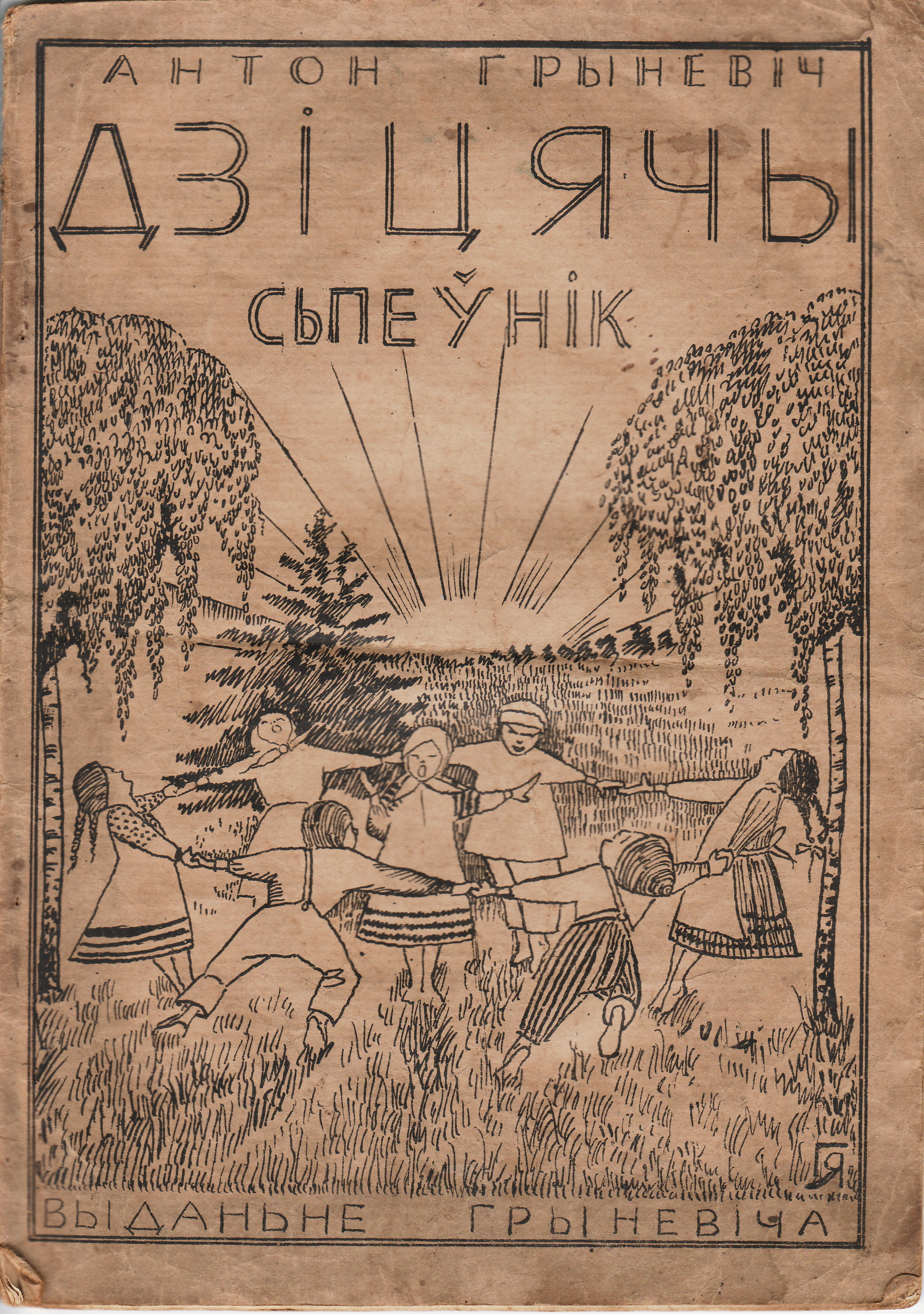 Беларуская (тарашкевіца): Антон Грыневіч "Дзіцячы Сьпеўнік" з малюнкамі Язэпа Горыда